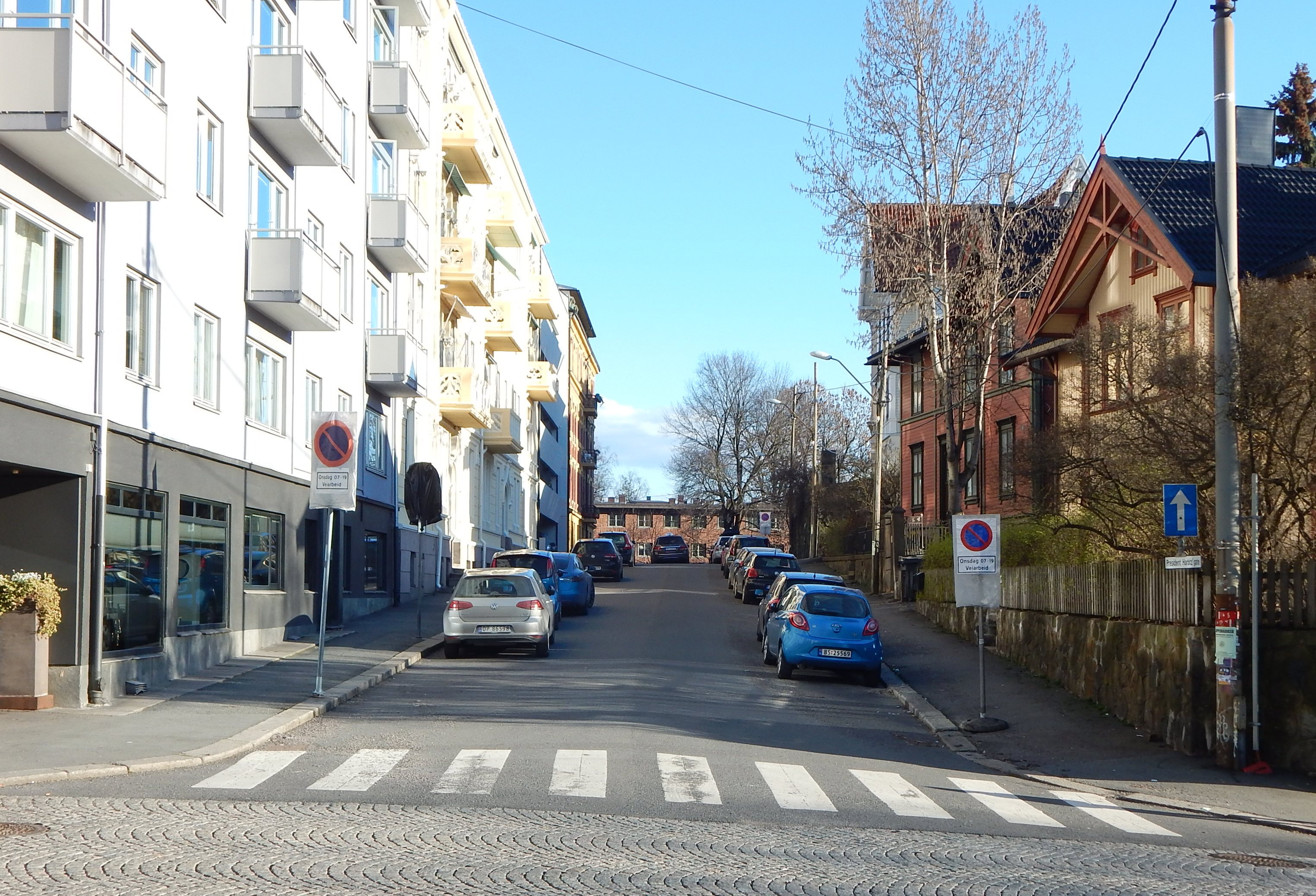 President Harbitz' gate sett fra Eilert Sundts gate